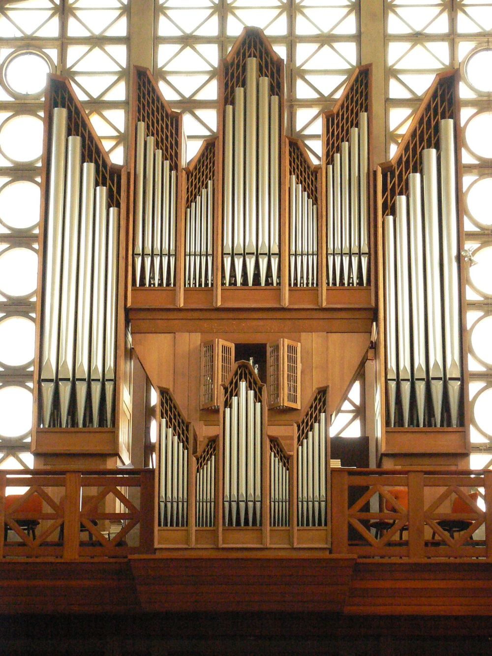 Moerdijk, Marcussen-orgel St Stefanuskerk